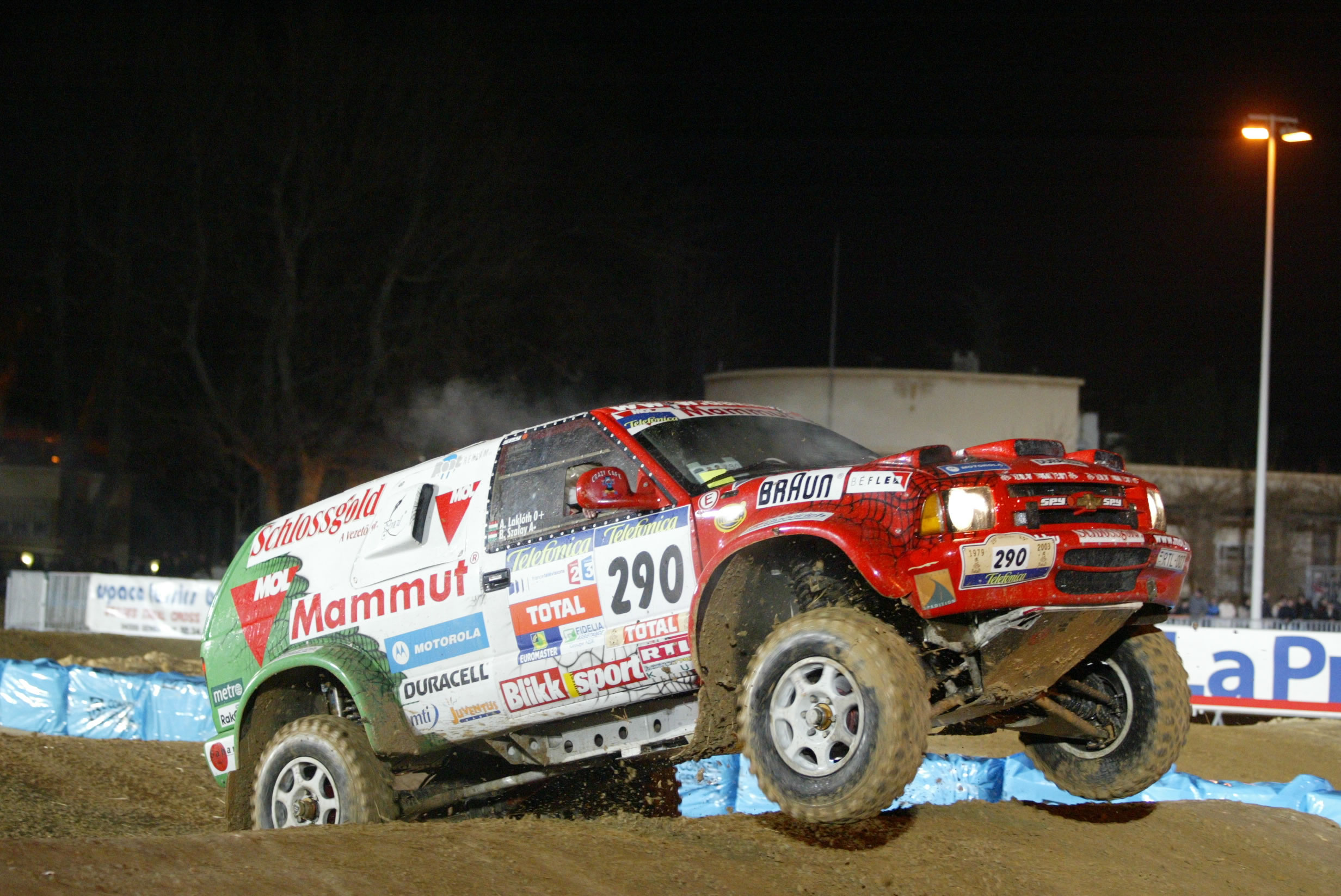 Szalay utoljára ment a Chevrolettel